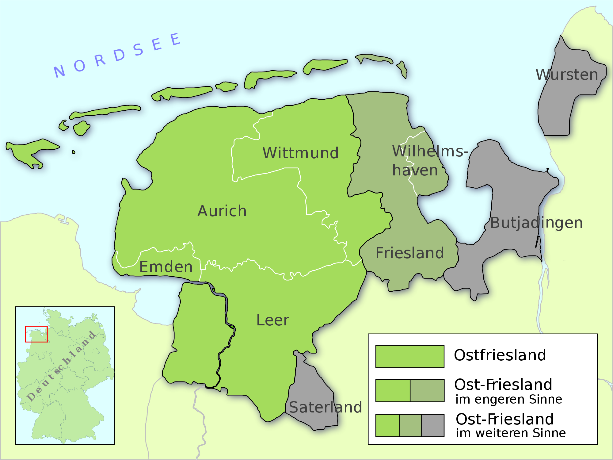 Regionen, die zu Ostfriesland bzw. zu Ost-Friesland gezählt werden